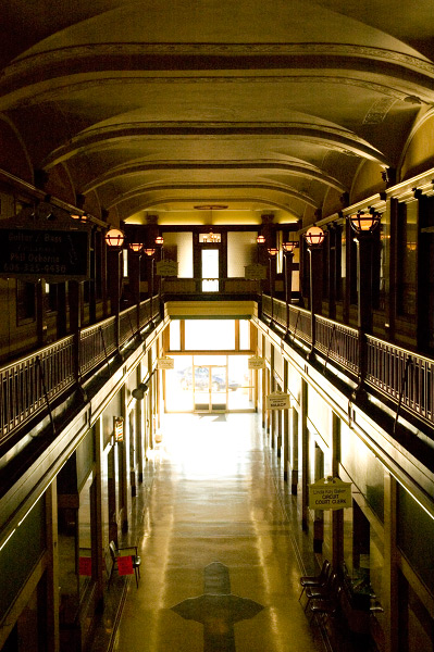 Camayo Arcade, Ashland, Kentucky